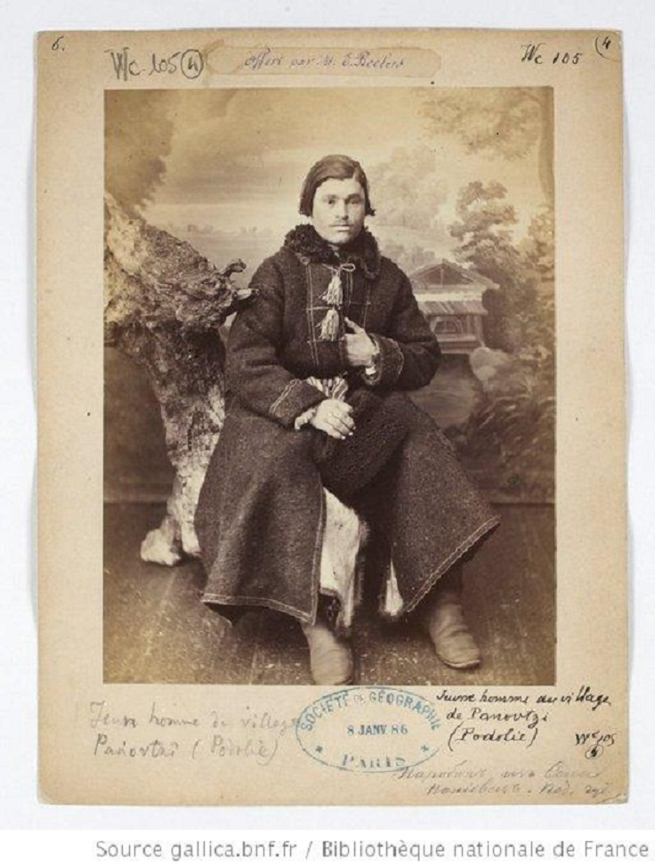 Podolia. Ukraine Парубок з с. Панівці, Подільської губернії 1886 p.. Опонча, каракулева шапка, кожух. юхтові чоботи